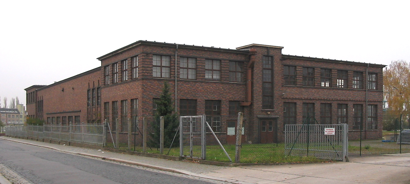 Radebeul, Chemische Fabrik v. Heyden, Forsttraße